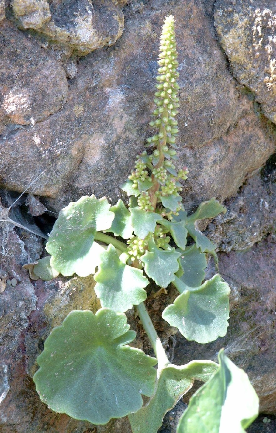 Umbilicus rupestris